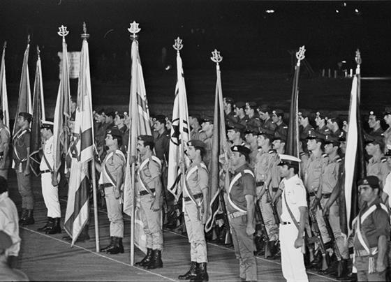 נשיא מצרים , אנואר סאדאת, מגיע ללוד לנמל התעופה בן-גוריון בביקור בישראל, מסדר כבוד של פרחי טיס ודגלנים